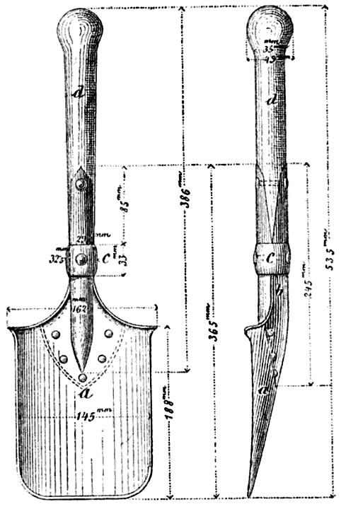 Das am 26. November 1874 auf höchsten kaiserlichen Erlaß hin befohlene tragbare Schanzzeug M1874 für deutsche Infanterie- und Jägerbataillone.